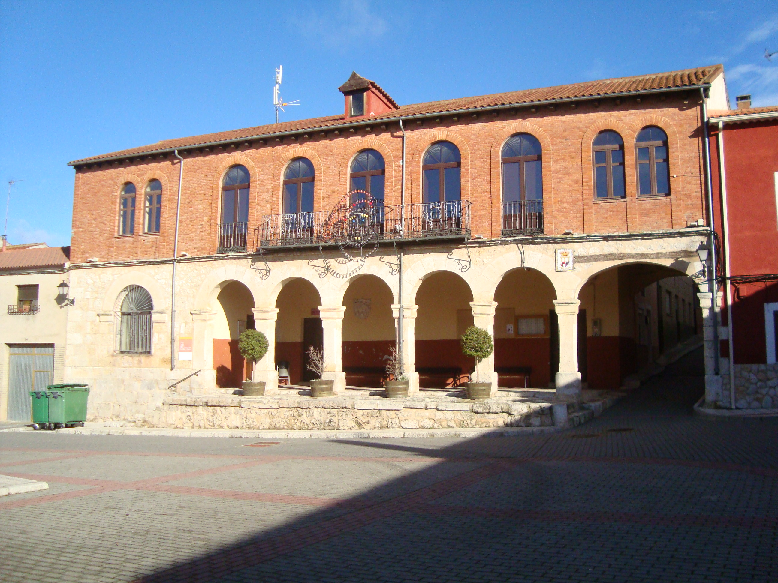 Casa consistorial de Piñel de Abajo (Valladolid).